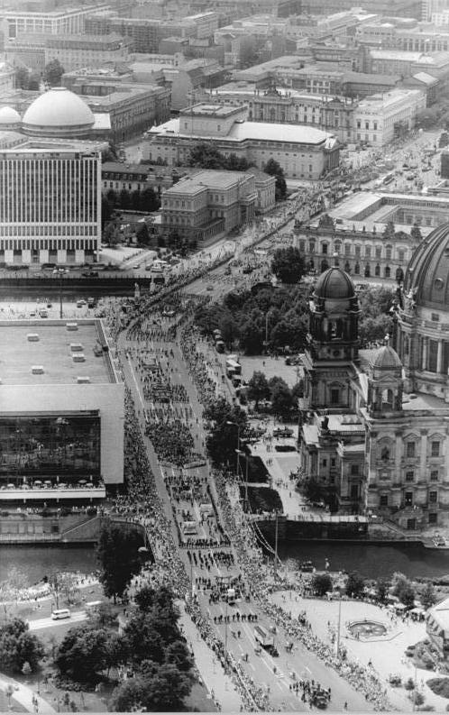 ADN-ZB Zimmermann 4.7.1987 Berlin: Jubiläum-Festumzug. Blick vom Fernsehturm in Richtung Straße Unter den Linden auf den großen Festumzug anläßlich des 750jährigen Stadtjubiläums.